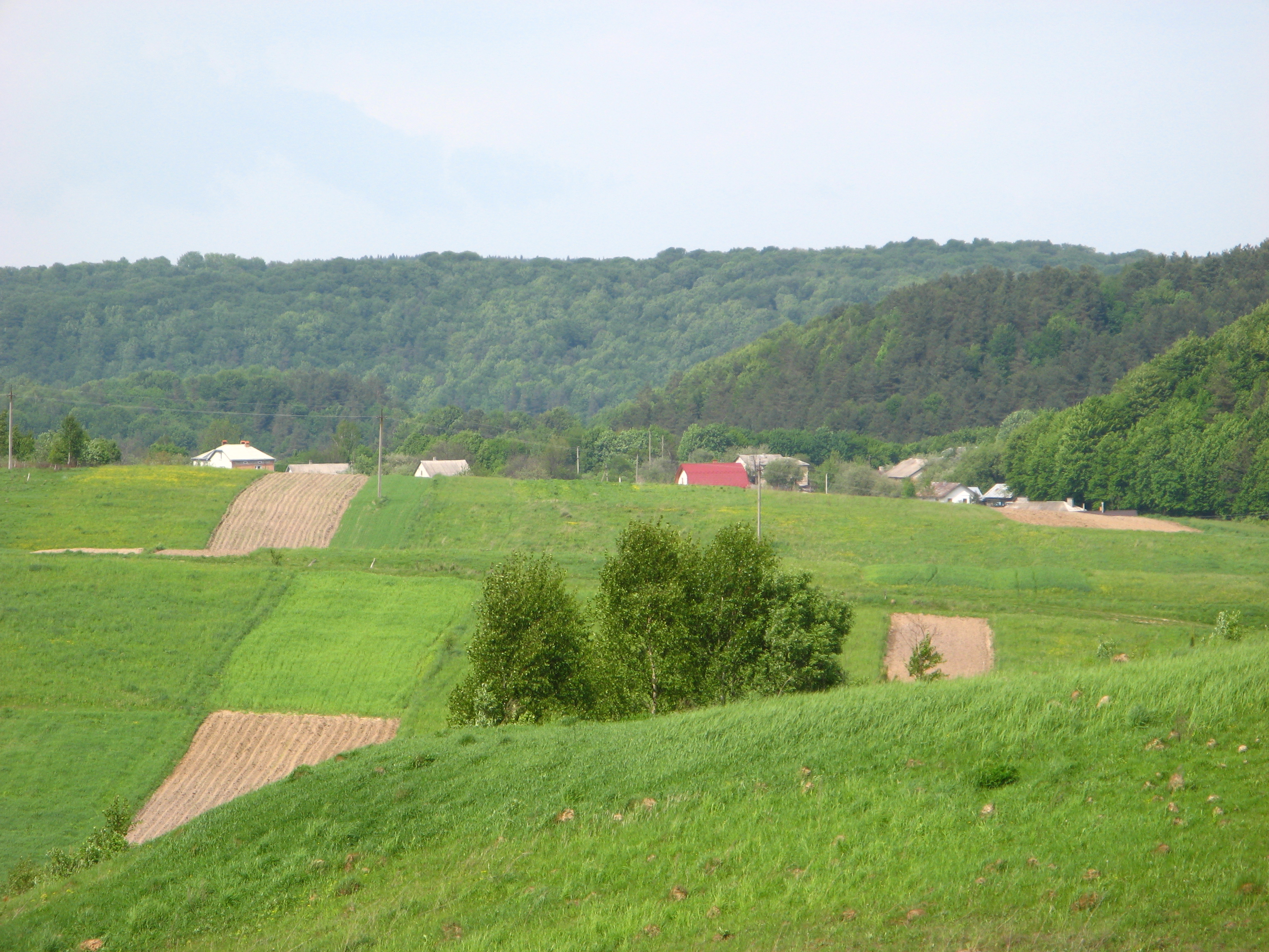 Mlynky_(Dubrowycia).JPG: Млинки - частина села Дубровиці (Яворівський район)